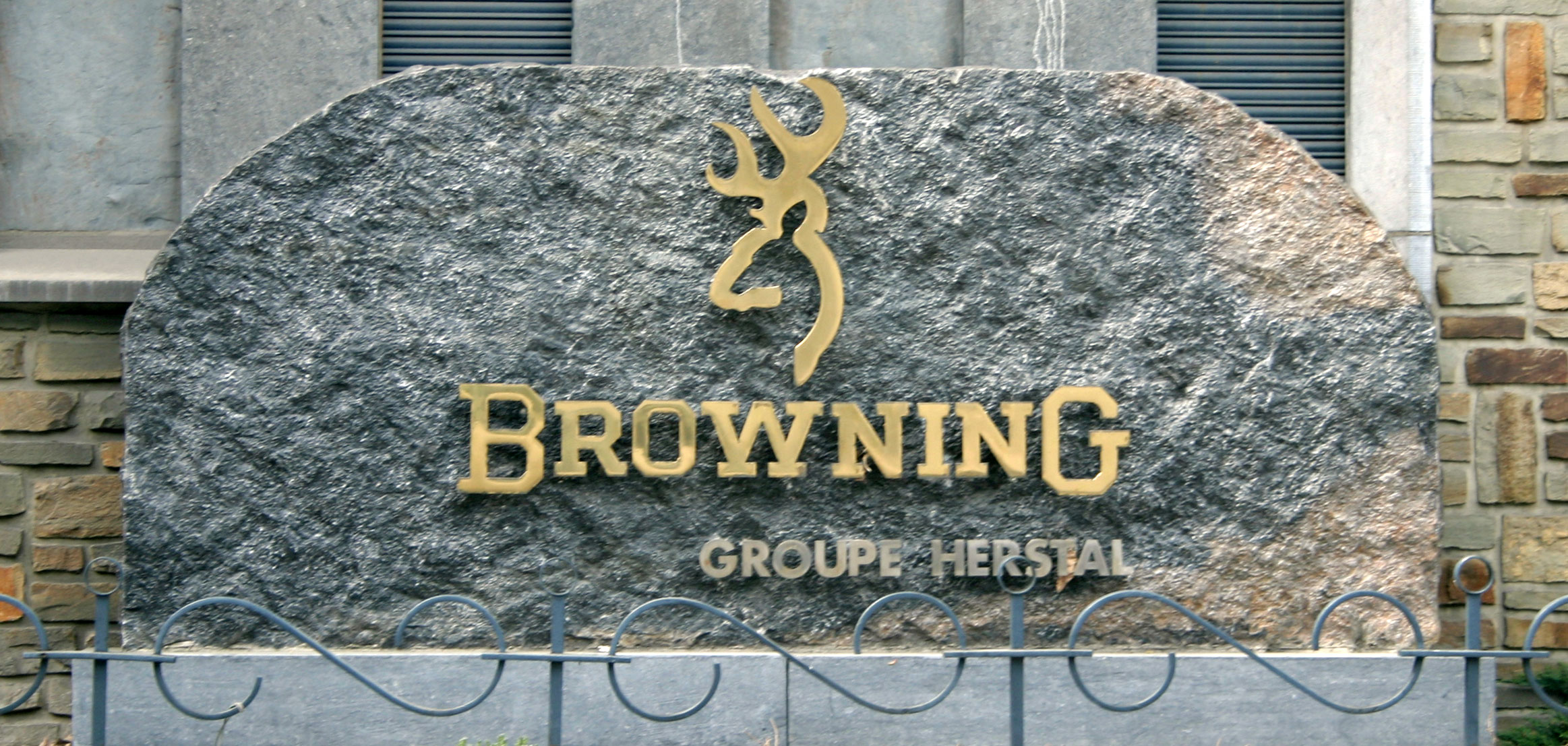 FN Browning.